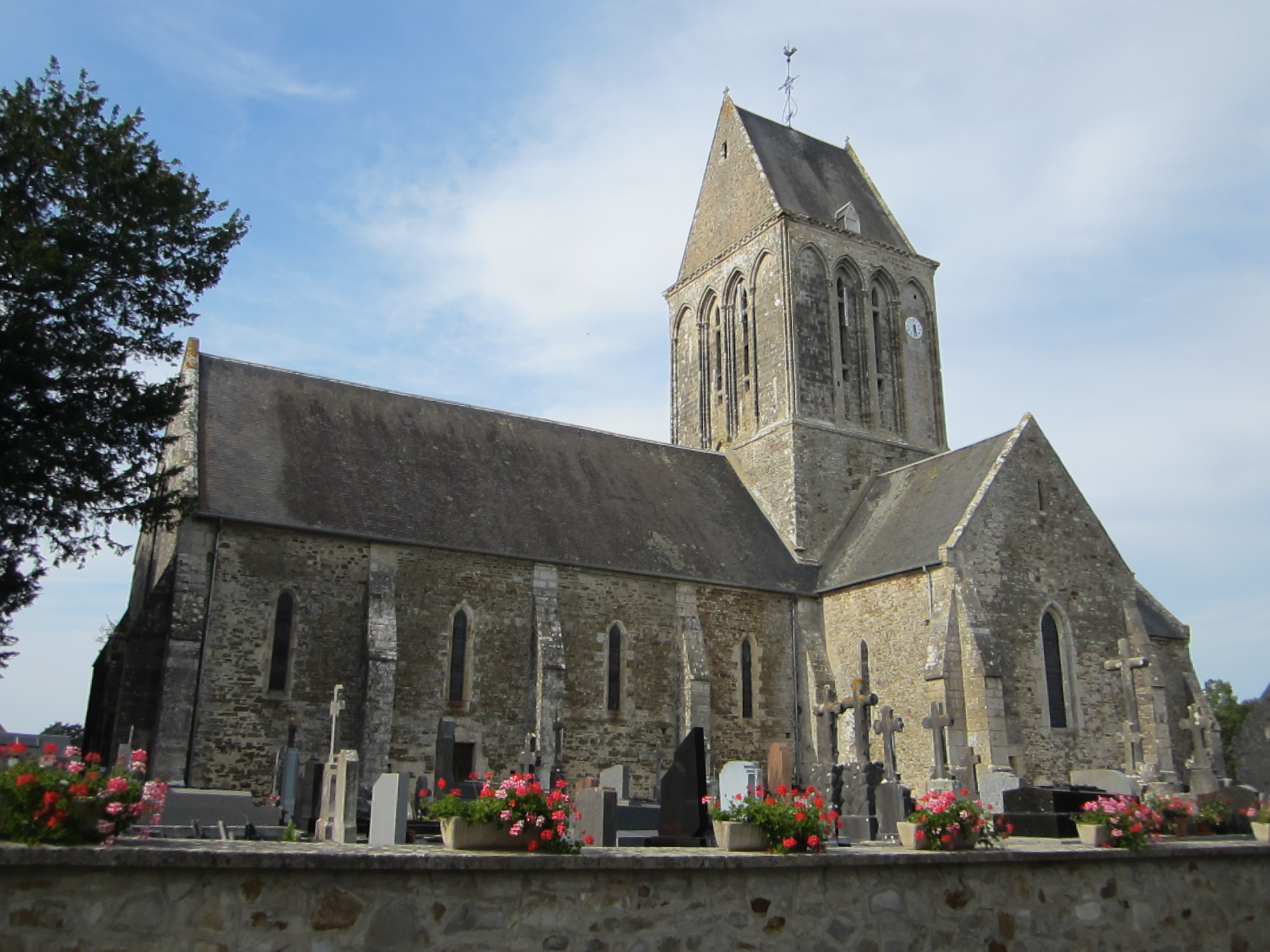 Église Notre-Dame de Gorges_(Manche)